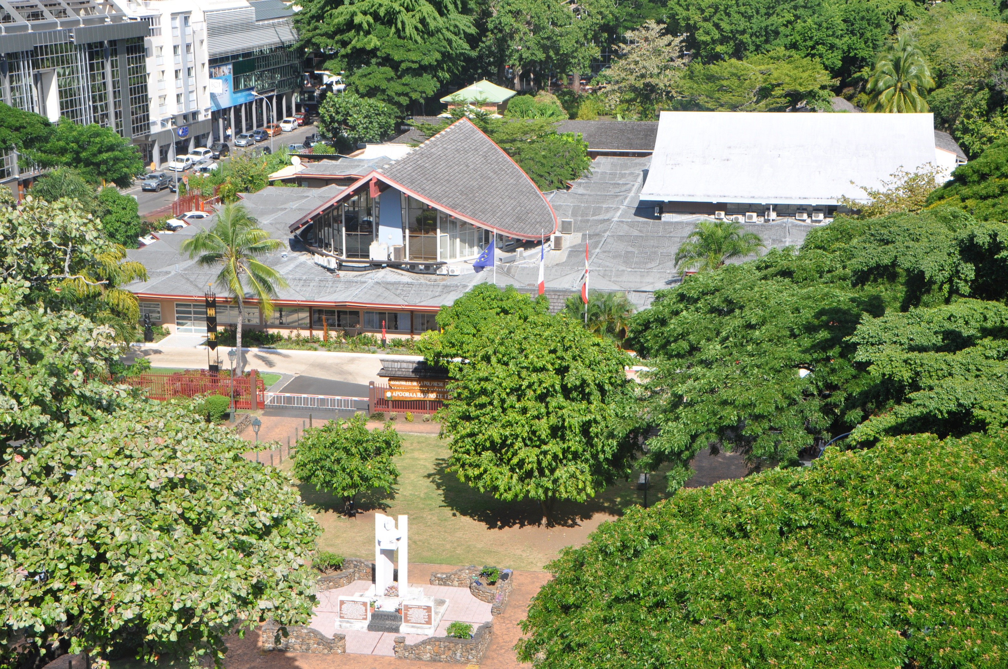 L'assemblée de la Polynésie française et le buste de Pouvanaa Oopa